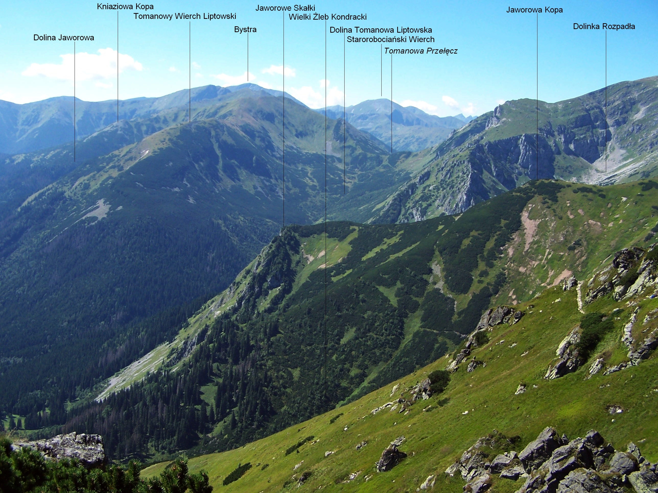 Widok z Goryczkowej Kopy